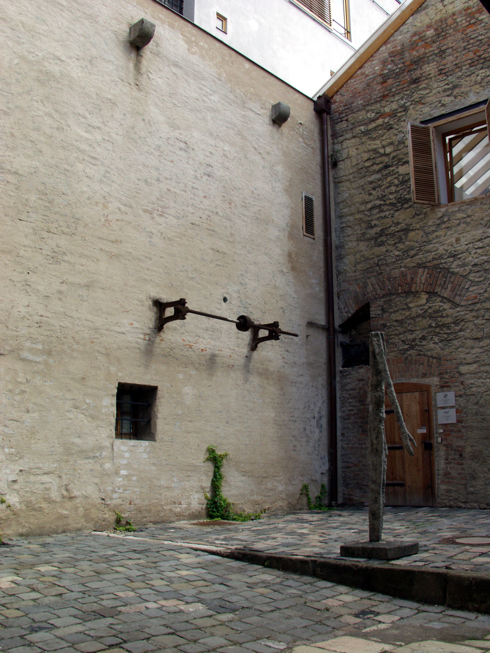 Zámecký pivovar Litomyšl. Rekonstrukce ing. arch. Josef Pleskot – AP ATELIER Praha.